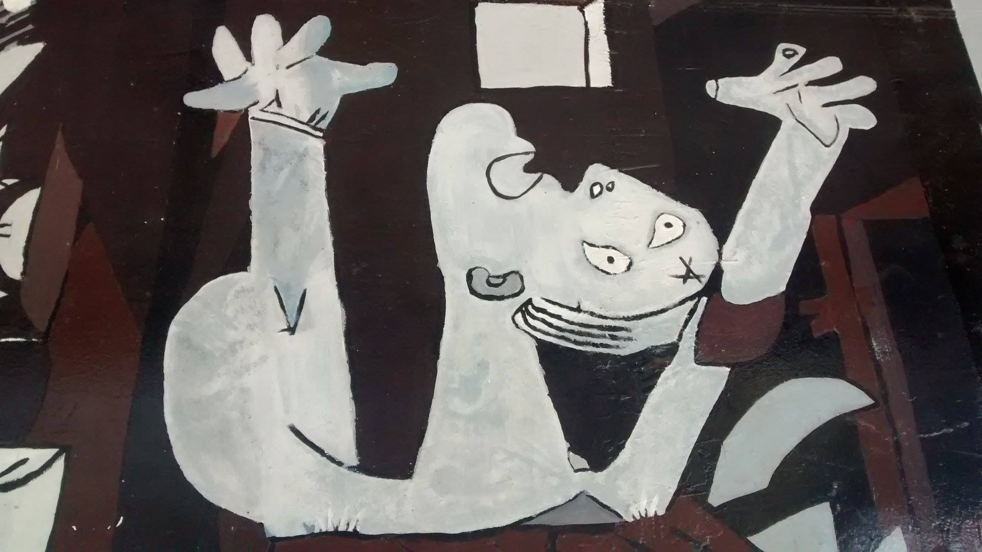 Pinturas de muralismo urbano público, en calle Carmen Covarrubias esquina Irarrázabal, en la comuna de Ñuñoa, Santiago de Chile.